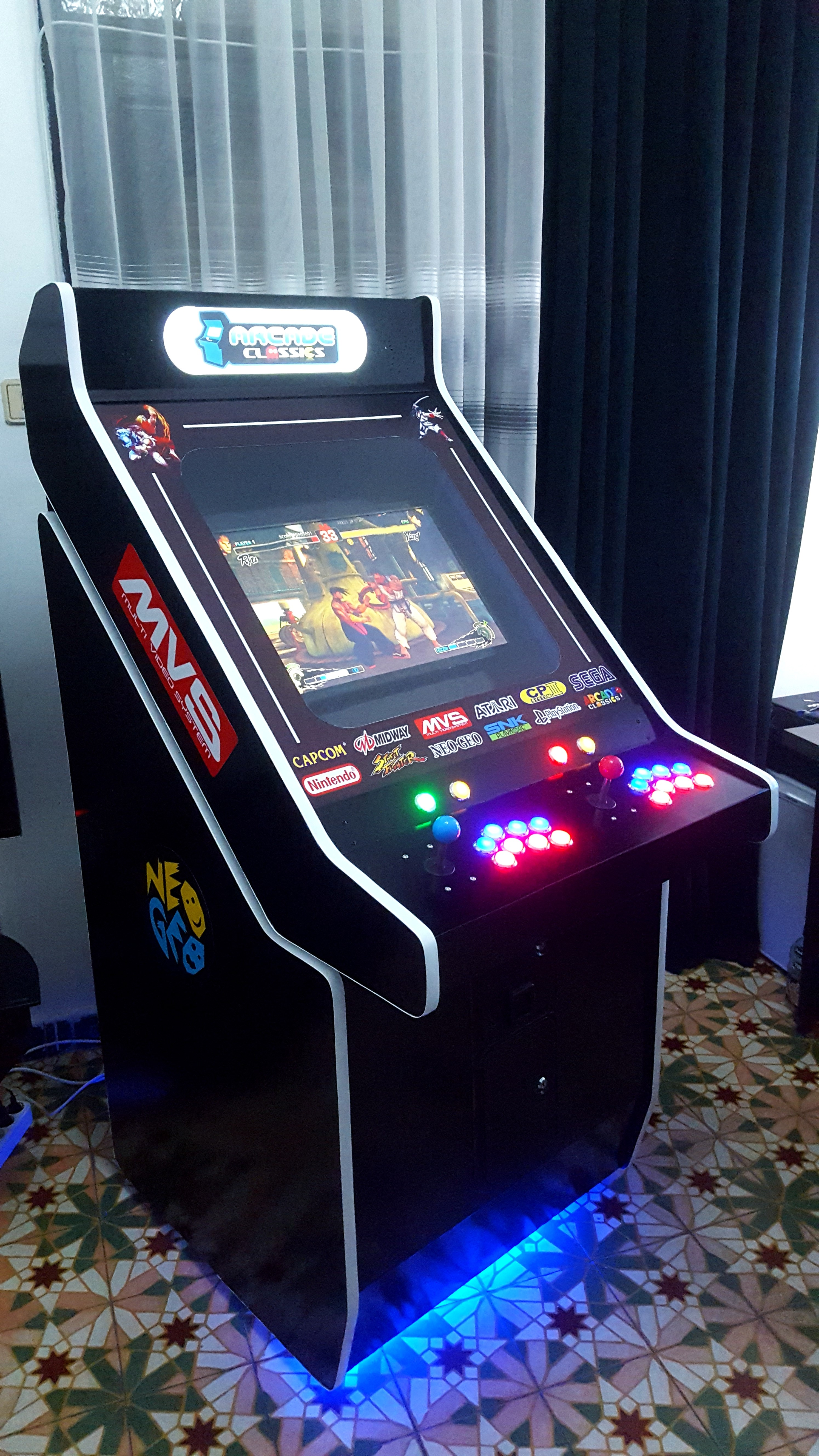 borne d'arcade n'styl